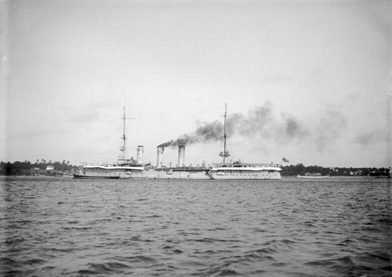 Kreuzer Königsberg zerschossen